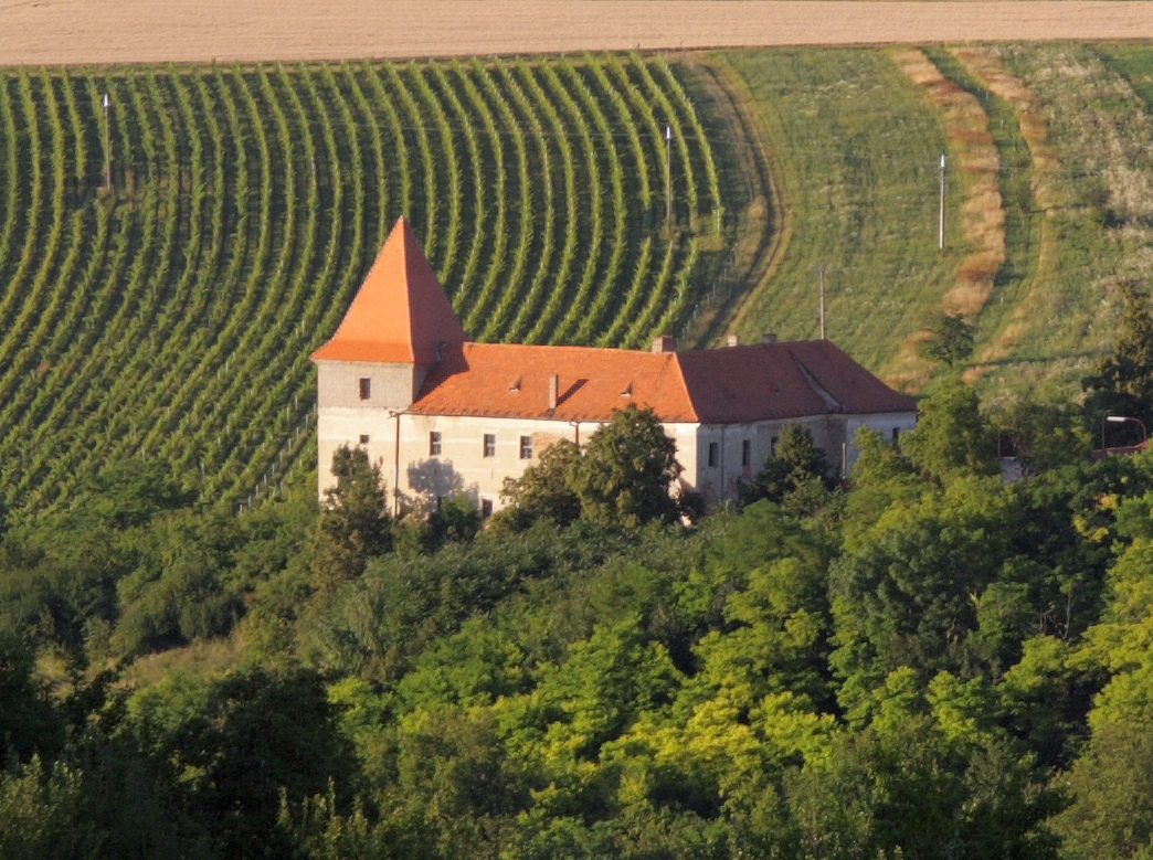 Bošovice - tvrz.